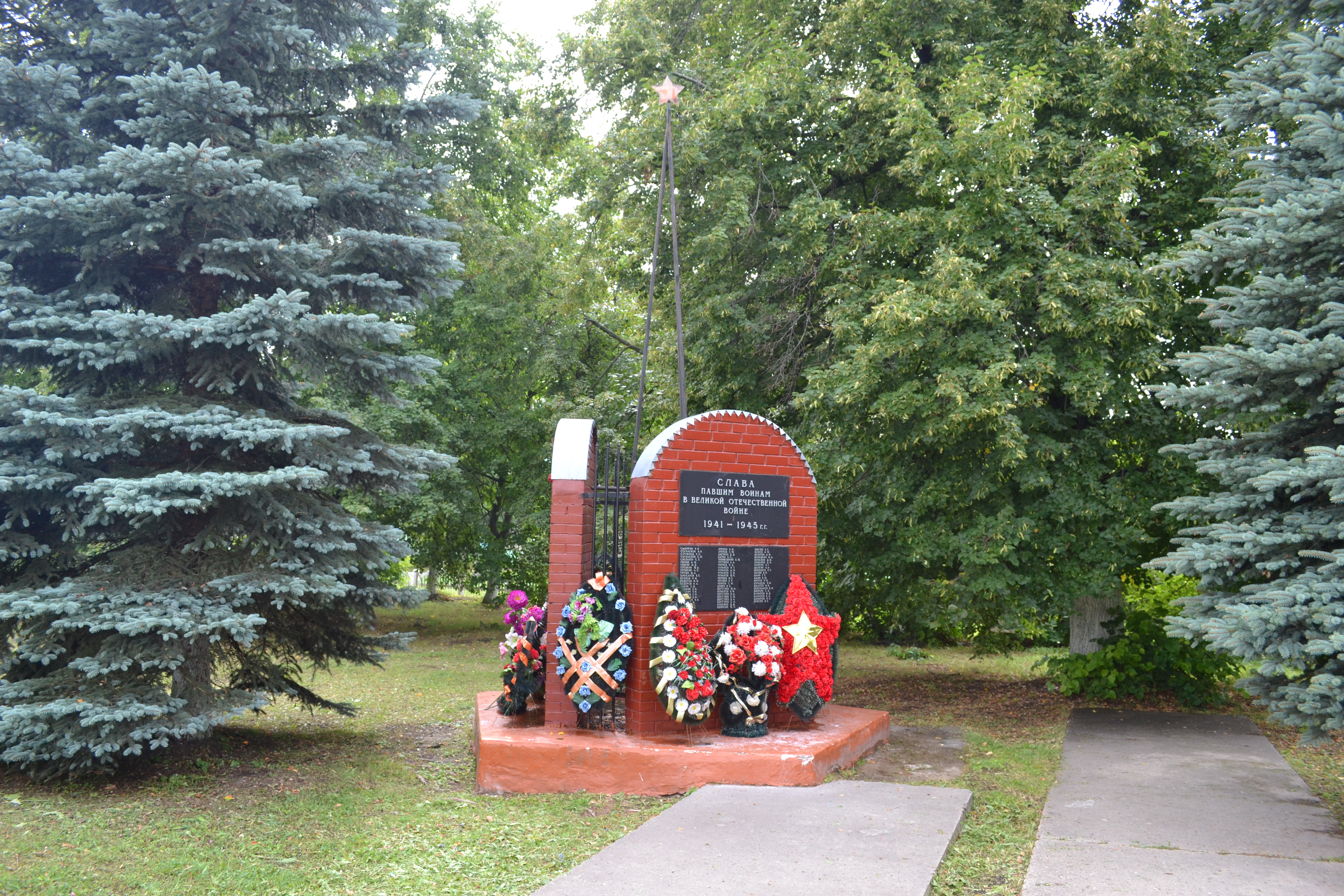 Мемориал в Дмитровском Погосте